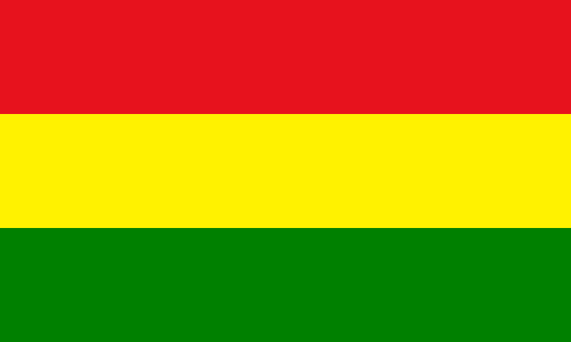 Bandera de Tiwintza